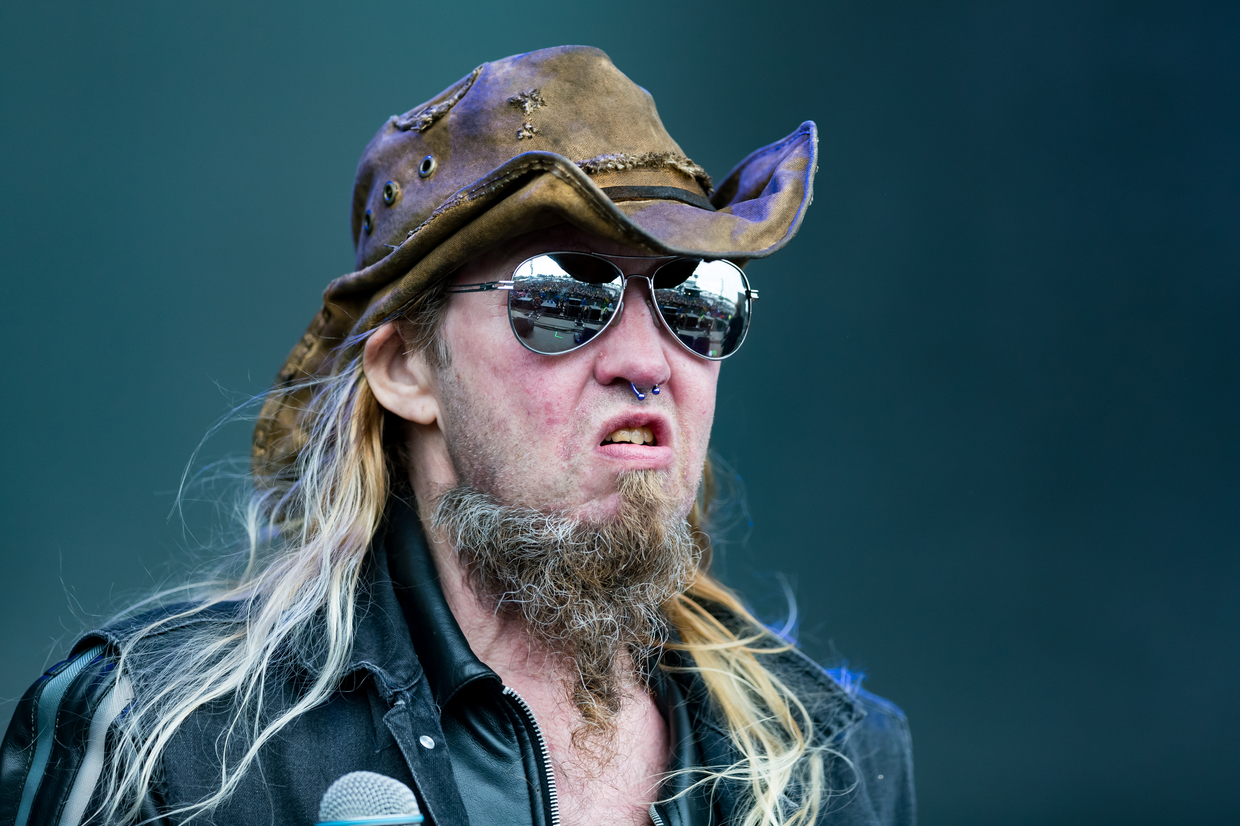 Sanctuary during Wacken Open Air at Schleswig-Holstein, Wacken, , Germany on 2017-08-04, Photo: Sven Mandel